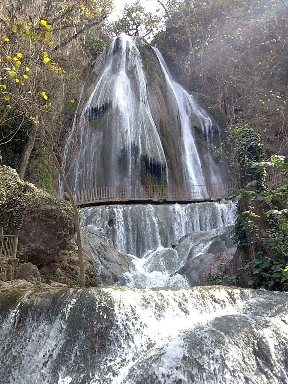 Parque Eco turístico Cola de Caballo en Santiago Nuevo Leon México